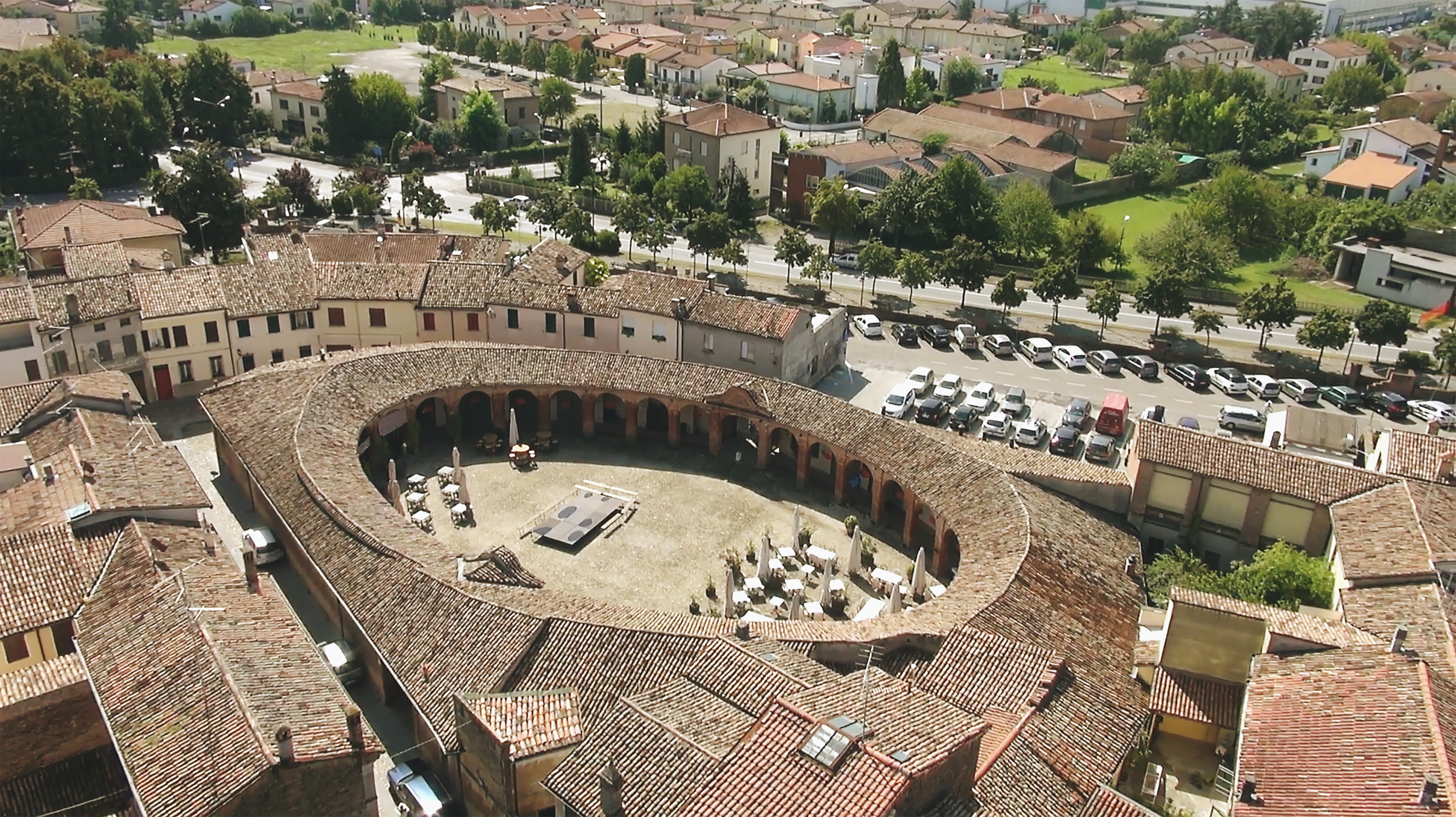 La settecentesca piazza con la sua originale forma ellittica è un simbolo della città